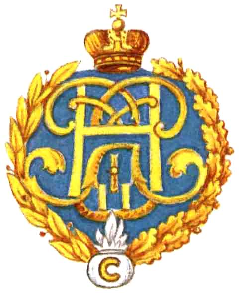 Badge of Rostovsky 2-nd Grenader Regiment